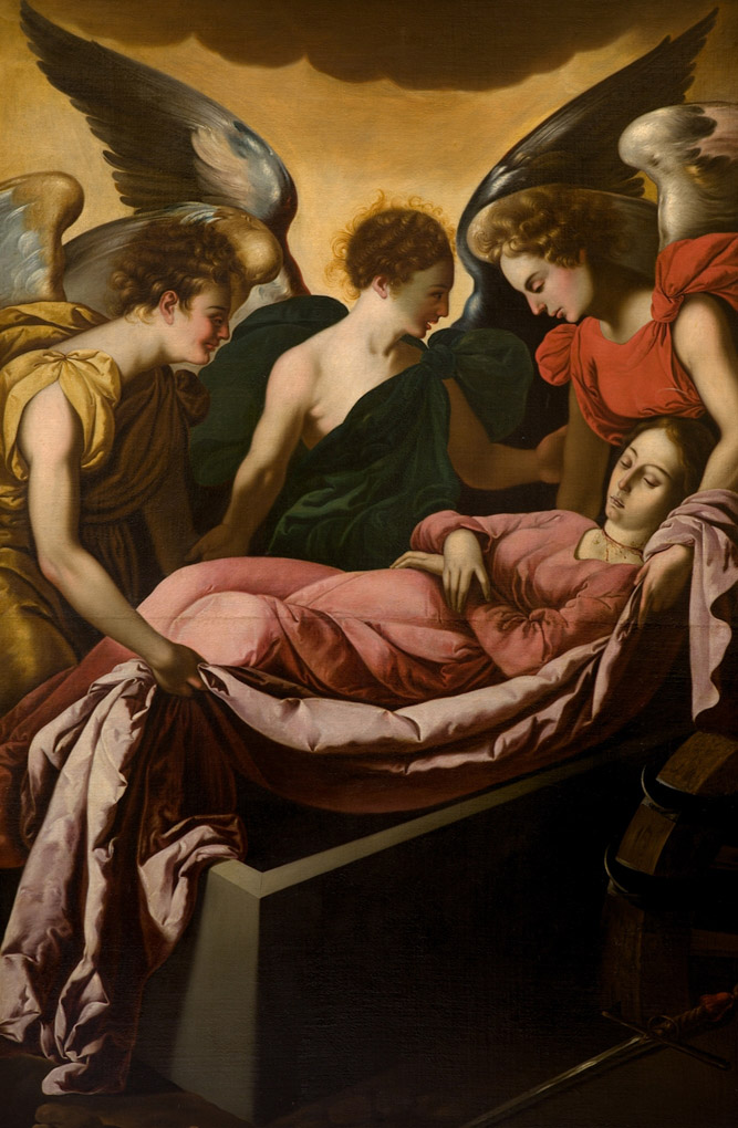 el lienzo El entierro de santa Catalina (O/L, 198 x 133 cm) de Francisco de Zurbarán (1598-1664).